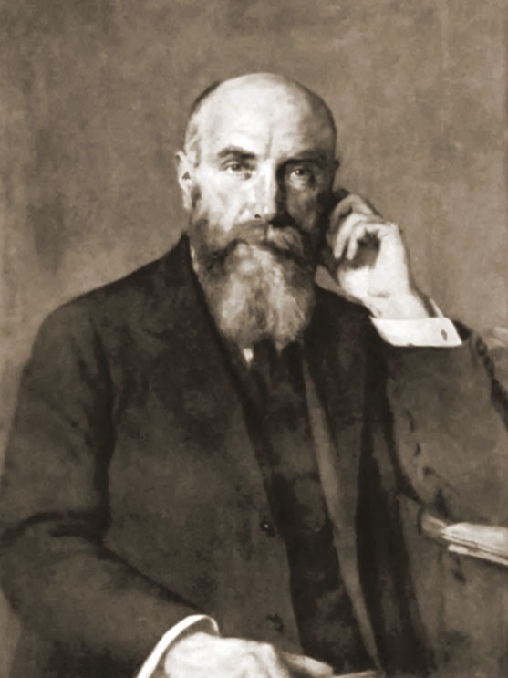 Францишек Буяк